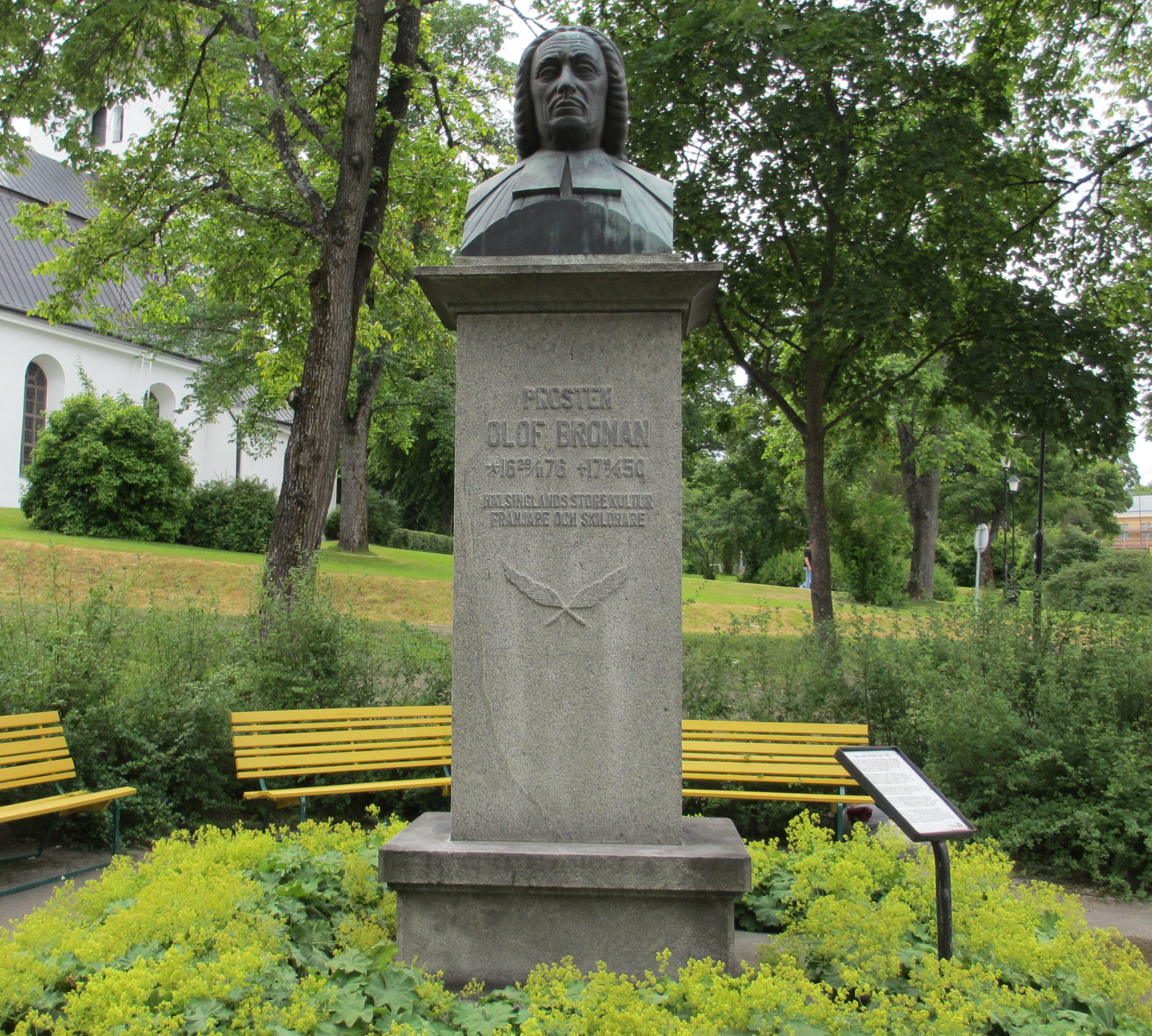 Monumentalbysten föreställlande prosten Olof Broman (1676-1750), som står vid Hudiksvalls kyrka, skulpterades 1931 av skulptören Carl Fagerberg (1878-1948).